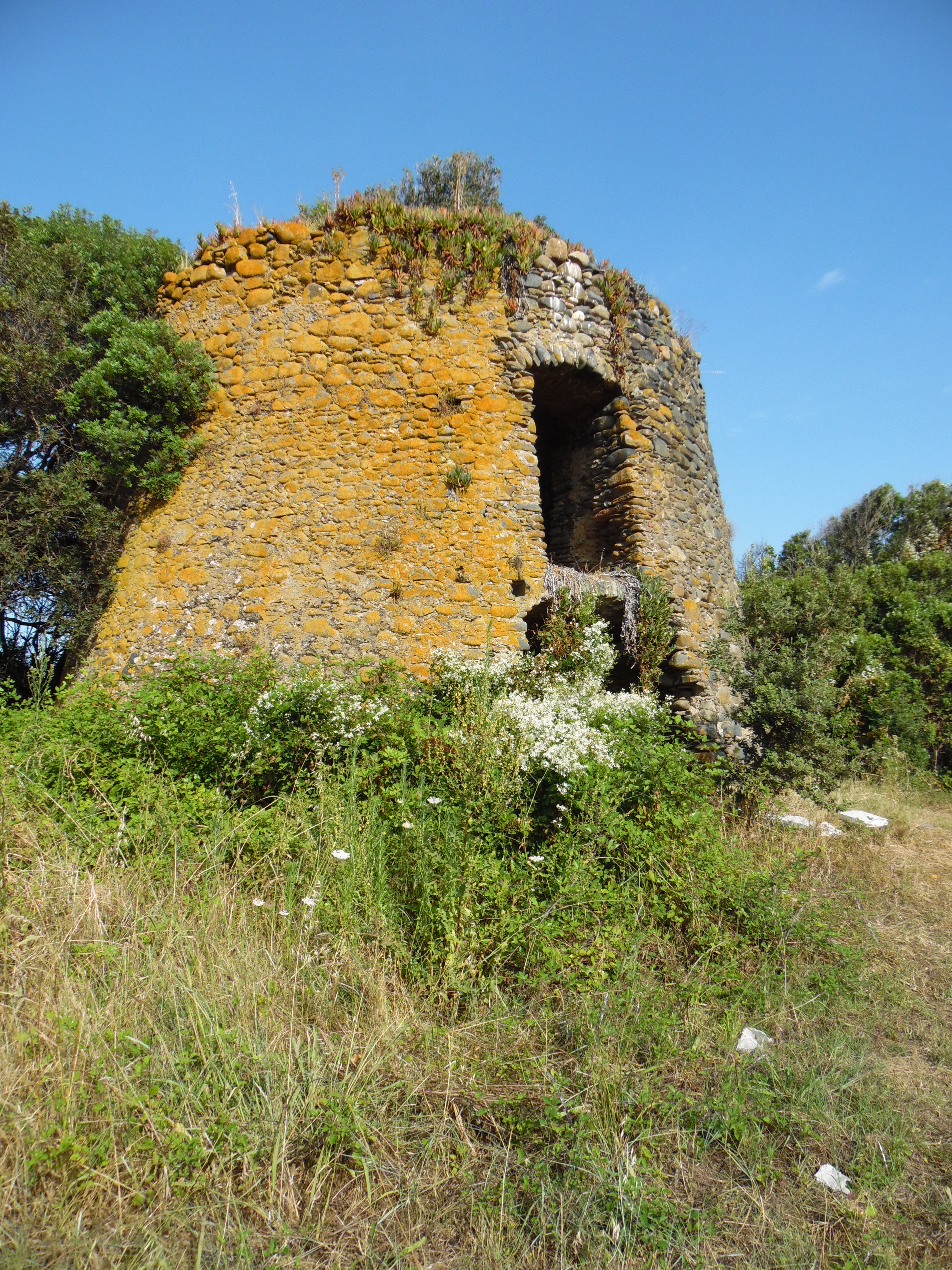 San Giuliano, Corse - Torra Fiorentine, tour génoise construite vers 1580, en ruines. Object location42° 17′ 00.03″ N, 9° 33′ 34.26″ E